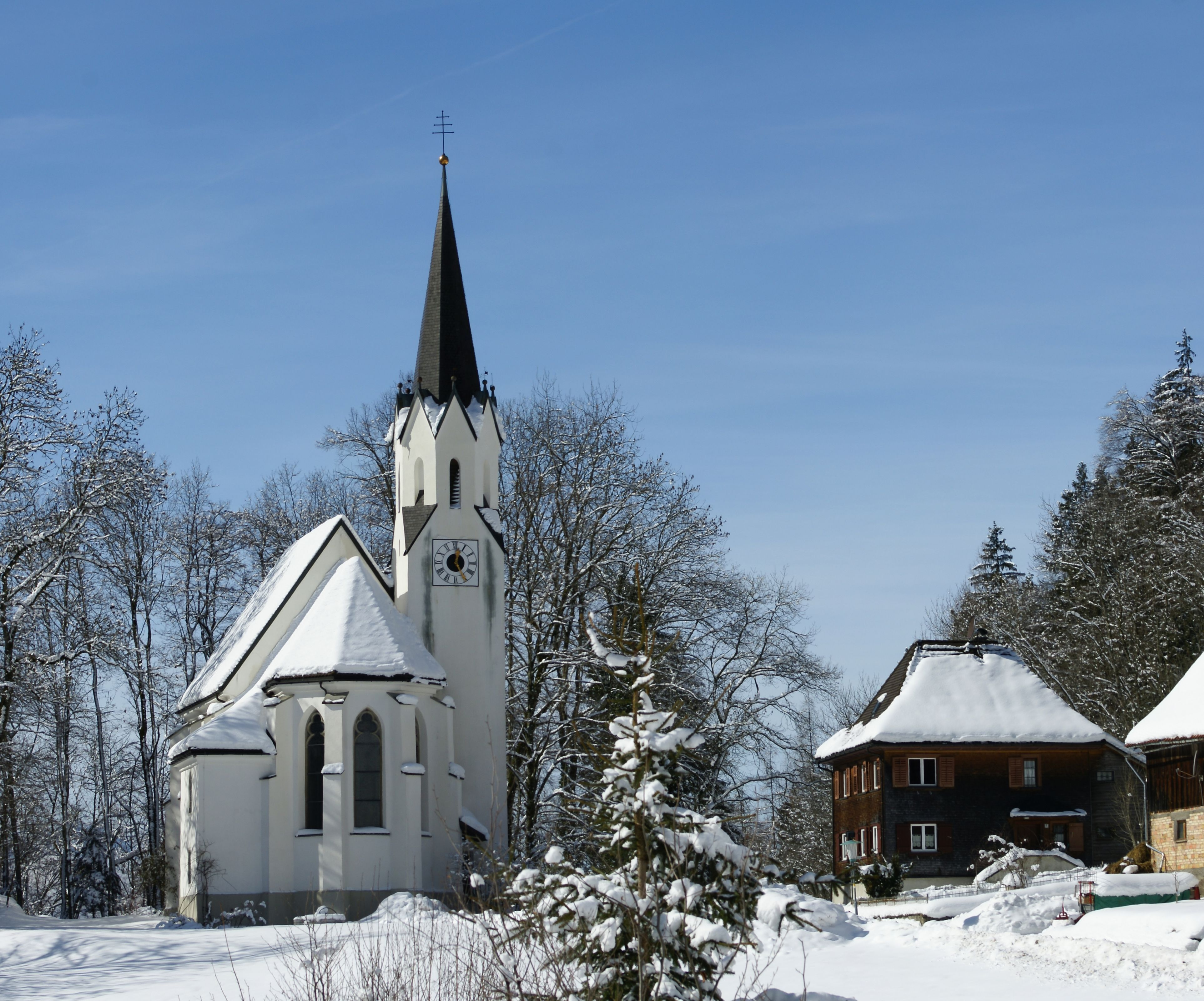 Panorama mit 5 Bilder. Die Kirche Hl. Wolfgang von Meschach bei Götzis wurde im neugotischen Stil 1881 bis 1883 errichtet.